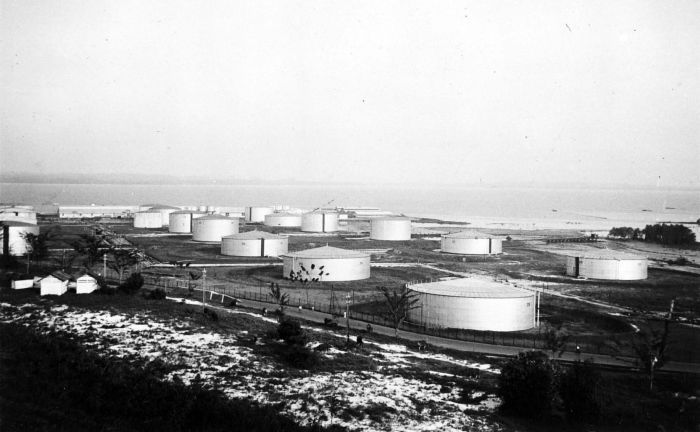 Repronegatief. Olietanks in Balikpapan.